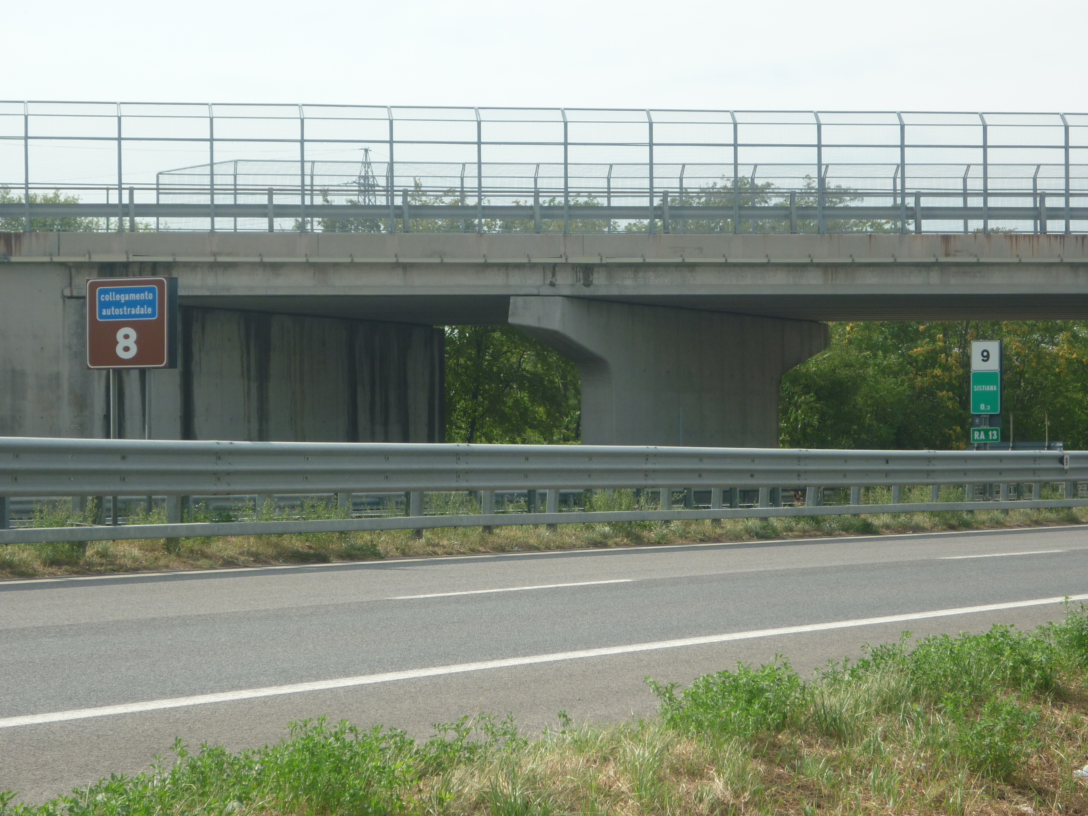 ra